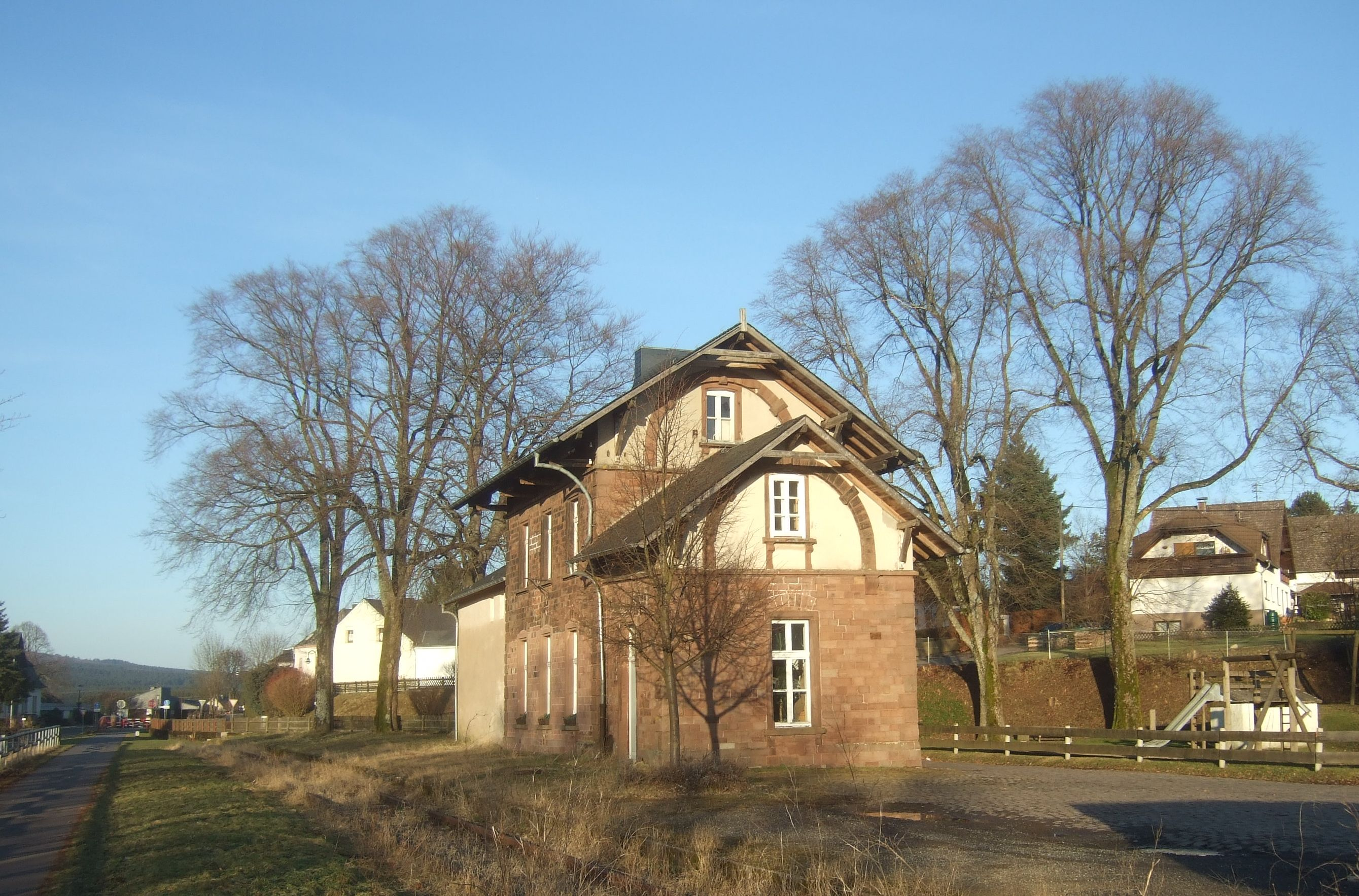 Alter Bahnhof in Kell am See